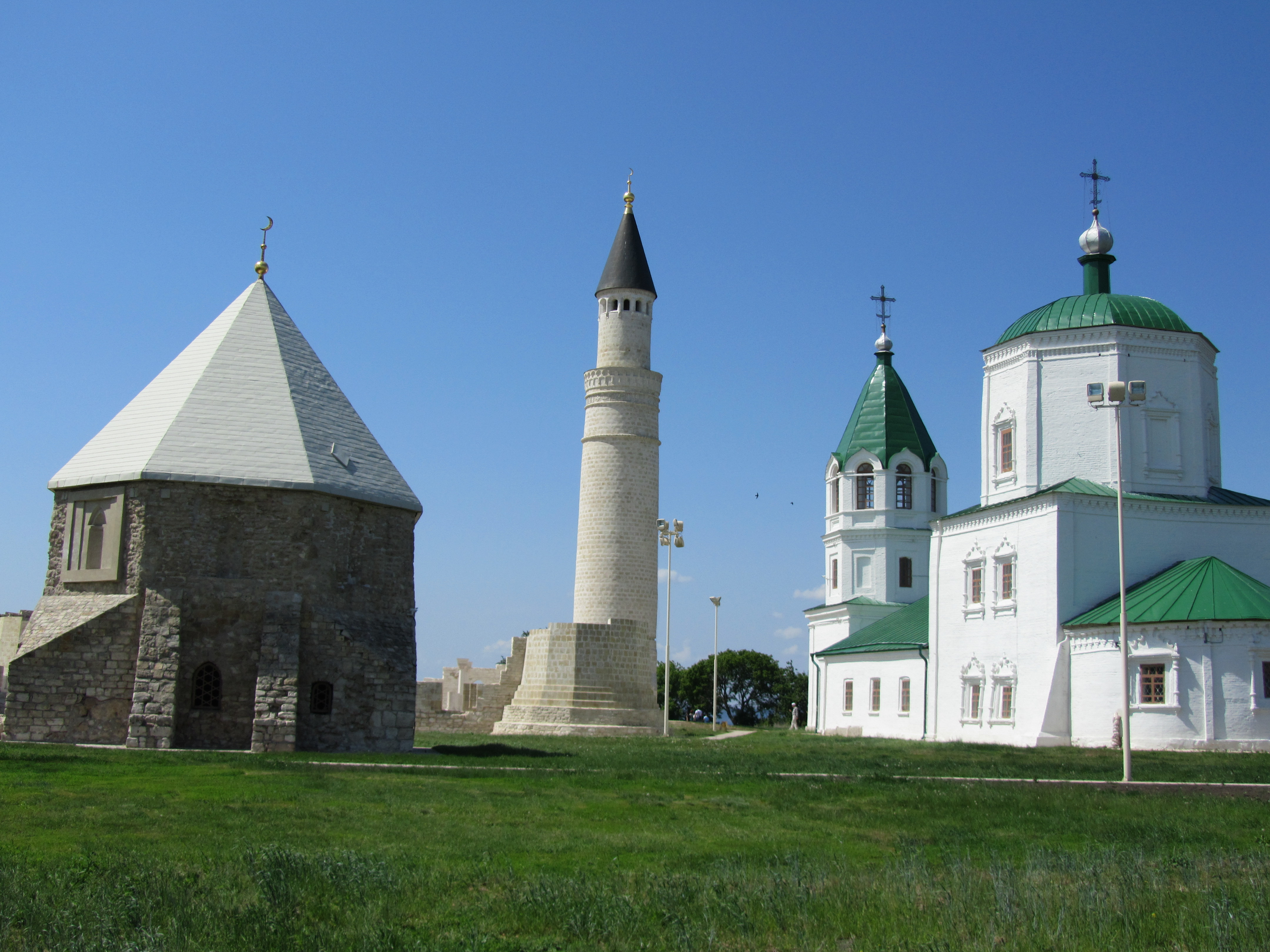 Комплекс памятников архитектуры XIII-XVIII вв. на территории Булгарского городища (архитектурный комплекс «Болгары») (Республика Татарстан, Болгар, село Болгары, городище)